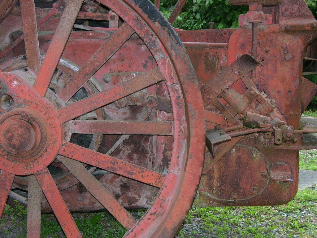 Museo del marmo - Carrara - Italia